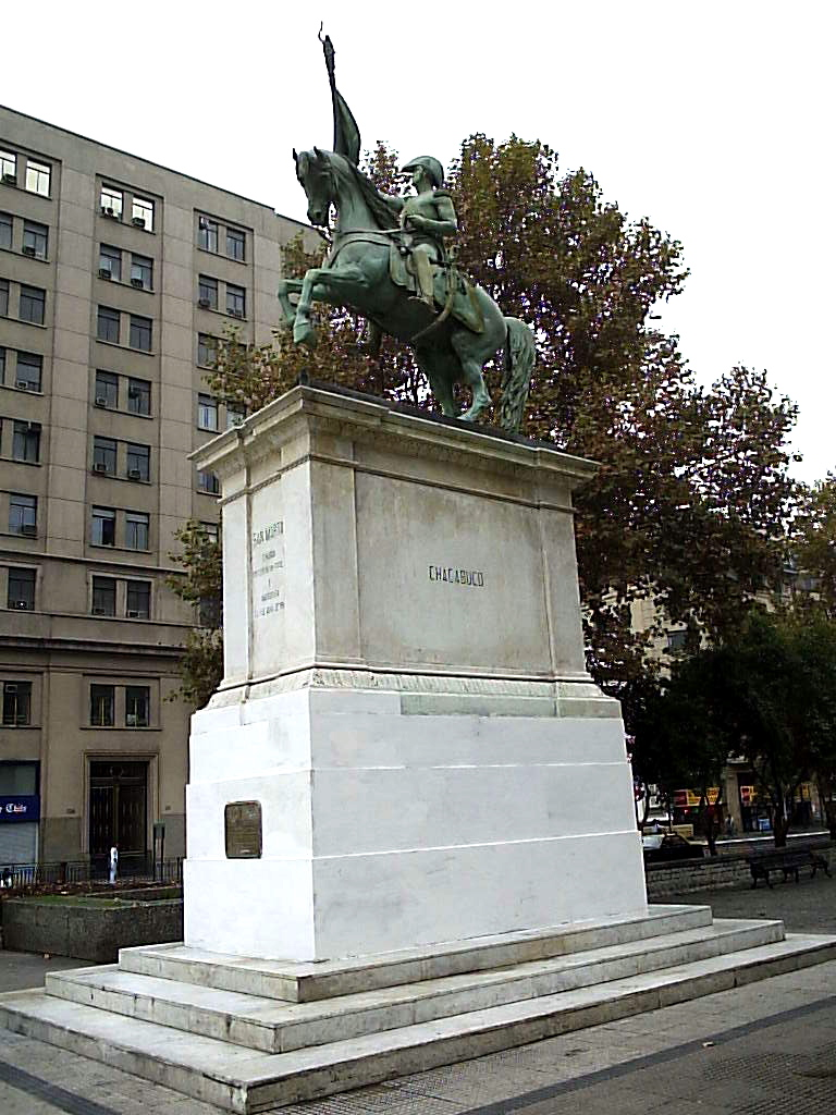 Estatua de José de San Martín en Santiago de Chile Autor:Alstradiaan Alstradiaan Blog Fecha:Abril de 2005 Fotografía tomada con una cámara digital Olympus camedia D-395 de 3.2 megapixeles